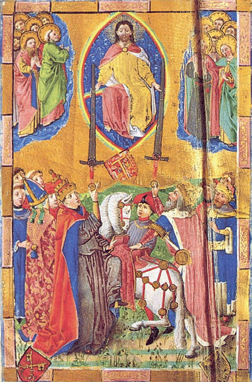 Christus in der Mandorla überreicht Papst und Kaiser die Schwerter der geistlichen und weltlichen Macht. Illustration der Zweischwerterlehre im Rechtsbuch des Sachsenspiegels 1442, Lüneburg Ratsbücherei (Ms.Jurid 1)